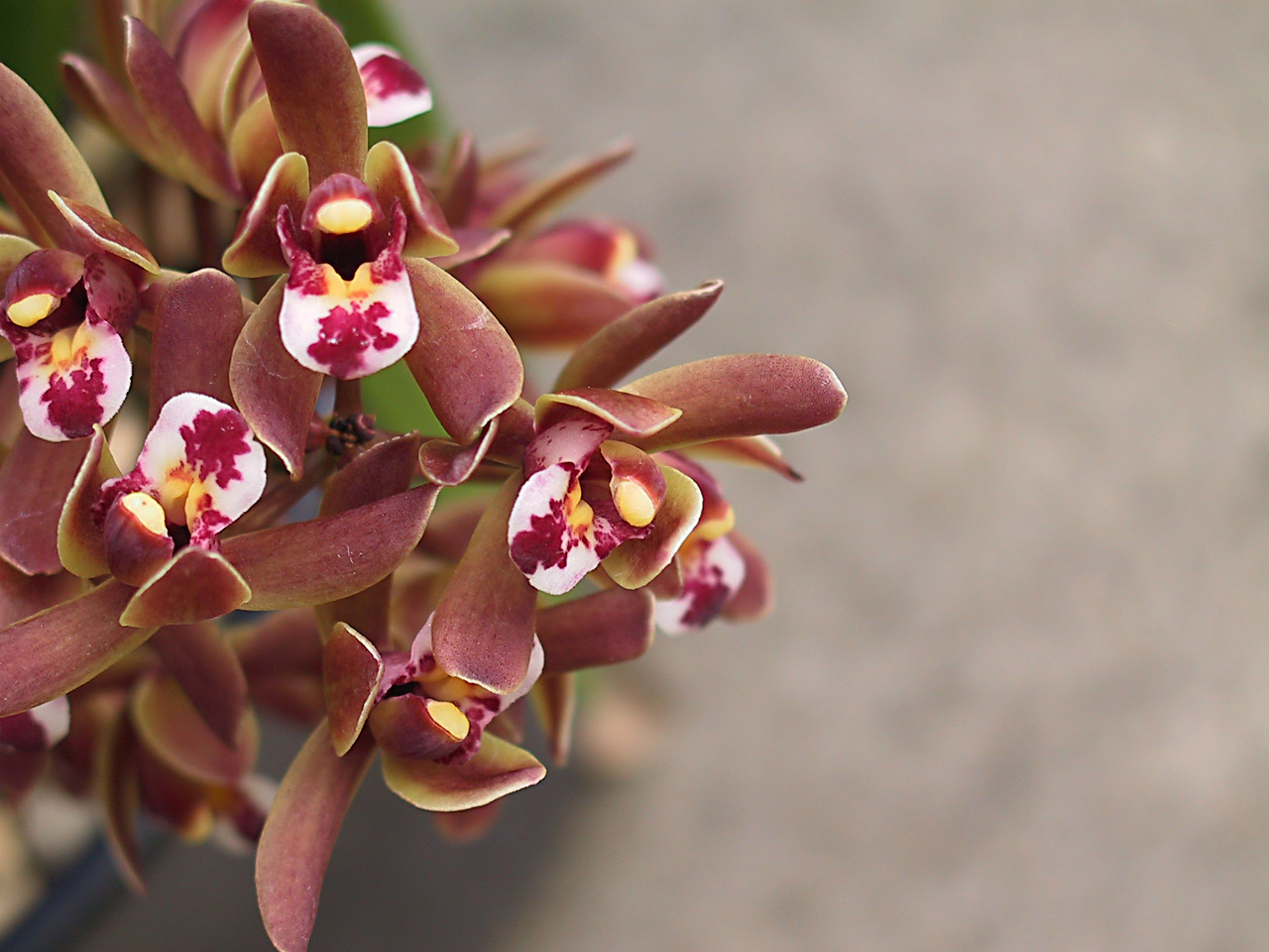 Cymbydium flowers